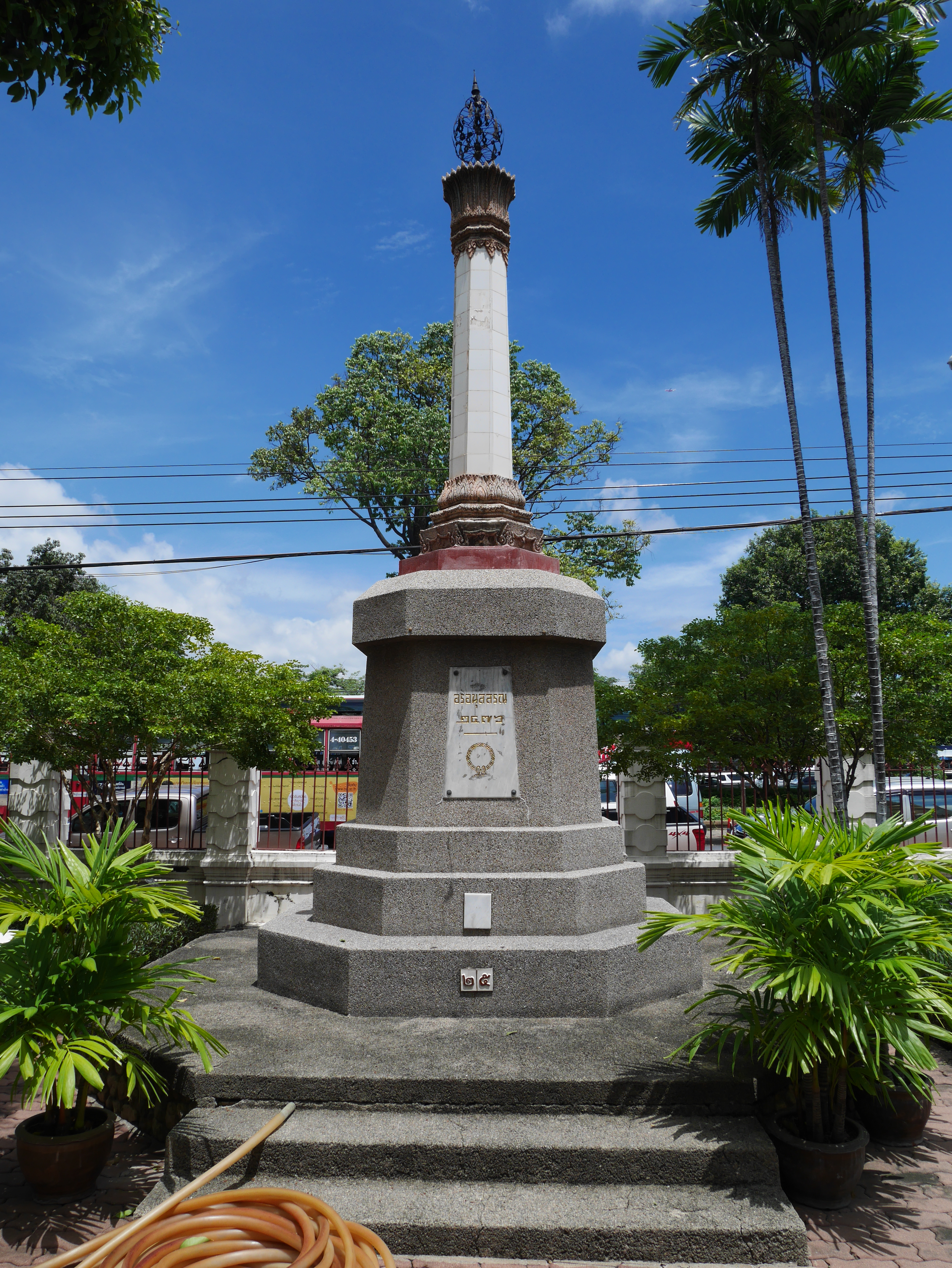 วัดราชบพิธ